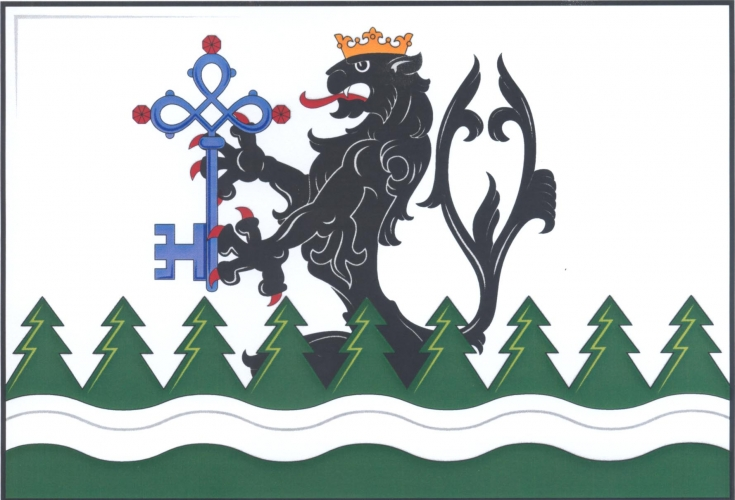 vlajka, Petrov nad Desnou, okres Šumperk